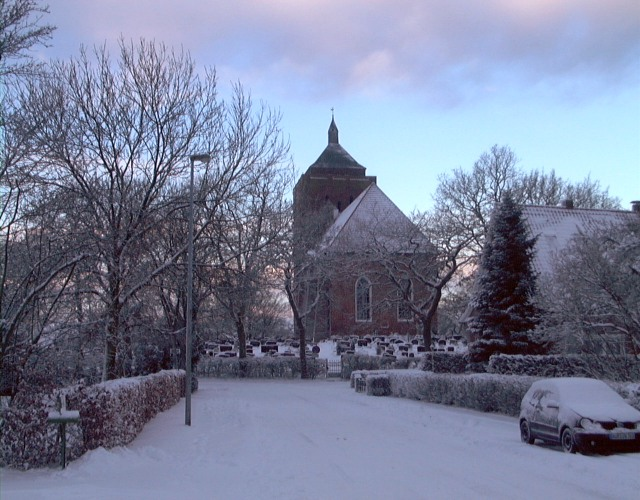 Osteeler Kirche mit Fabriciusdenkmal / Fabriciusstraße (selbst fotografiert)